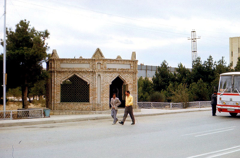 Zagulba - Baku - lokalization circa about 10km